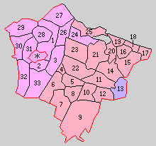 富山県射水郡の町村。